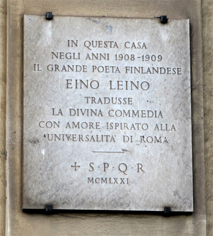 Muistolaatta Roomassa Tiberin rannalla sen rakennuksen seinässä, jossa Leino asui suomentaessaan Danten "Divina Commediaa".